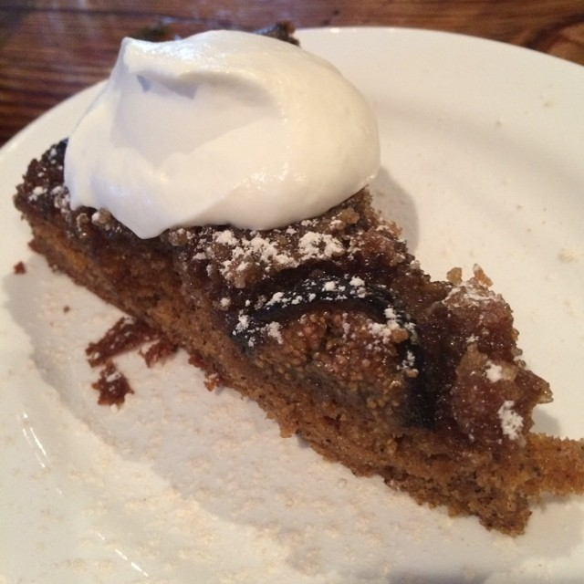 Fig Skillet Cake